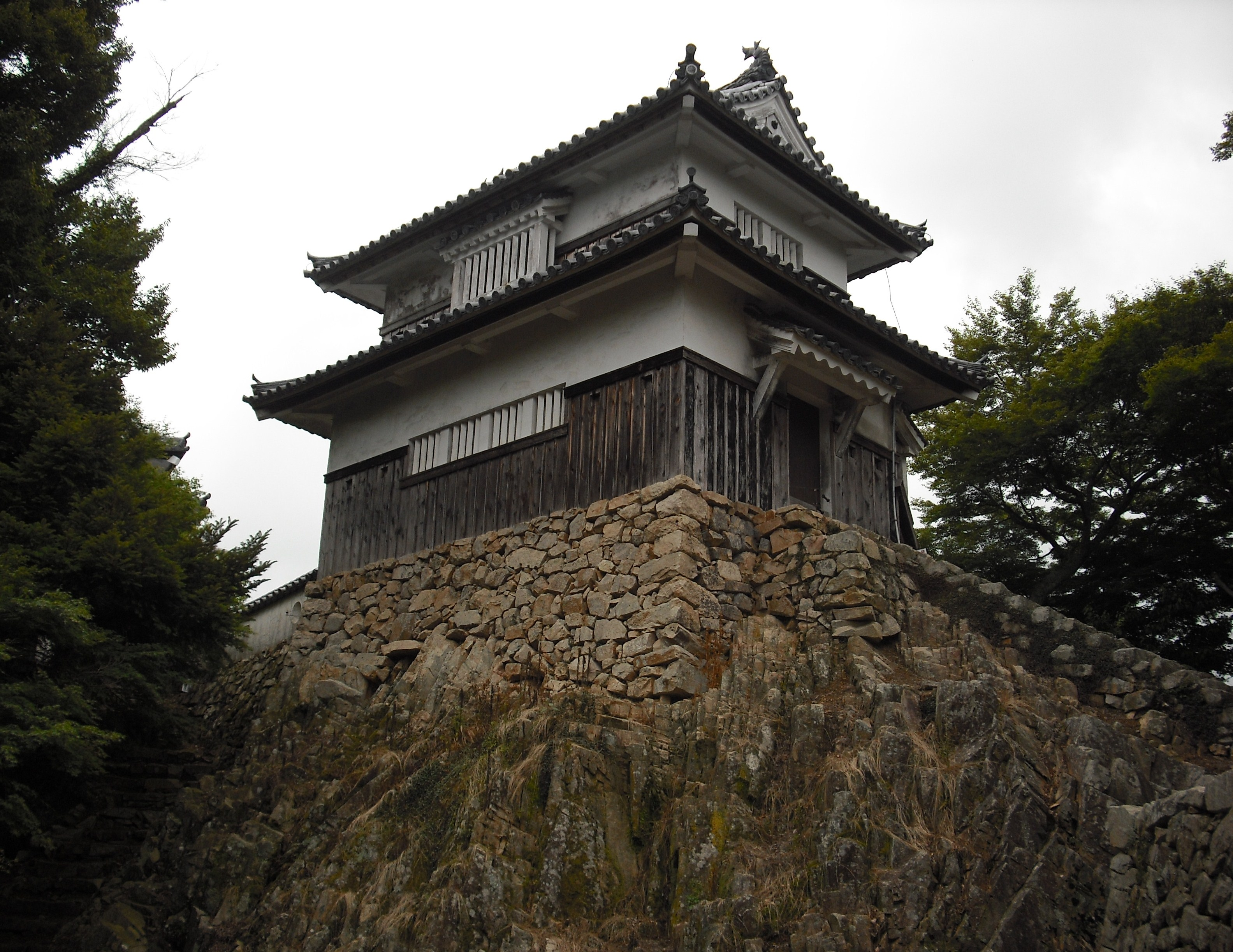 備中松山城 二重櫓